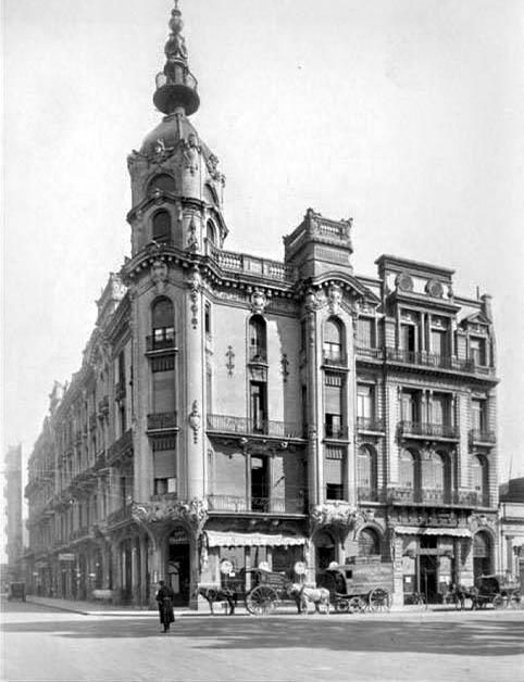 Vista del edificio de viviendas proyectado por Alfred Massüe para David Costaguta en 1903. En la esquina de Talcahuano con Tucumán, frente al Palacio de Tribunales en Buenos Aires, fue parcialmente demolido en 1989.